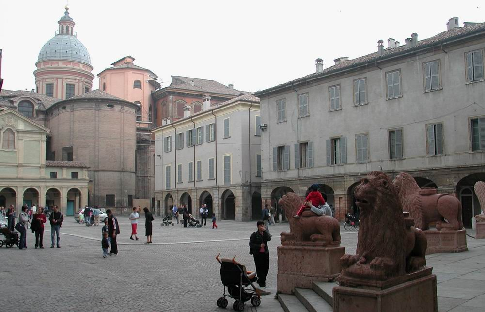 Reggio Emilia, Piazza San Prospero, 2004